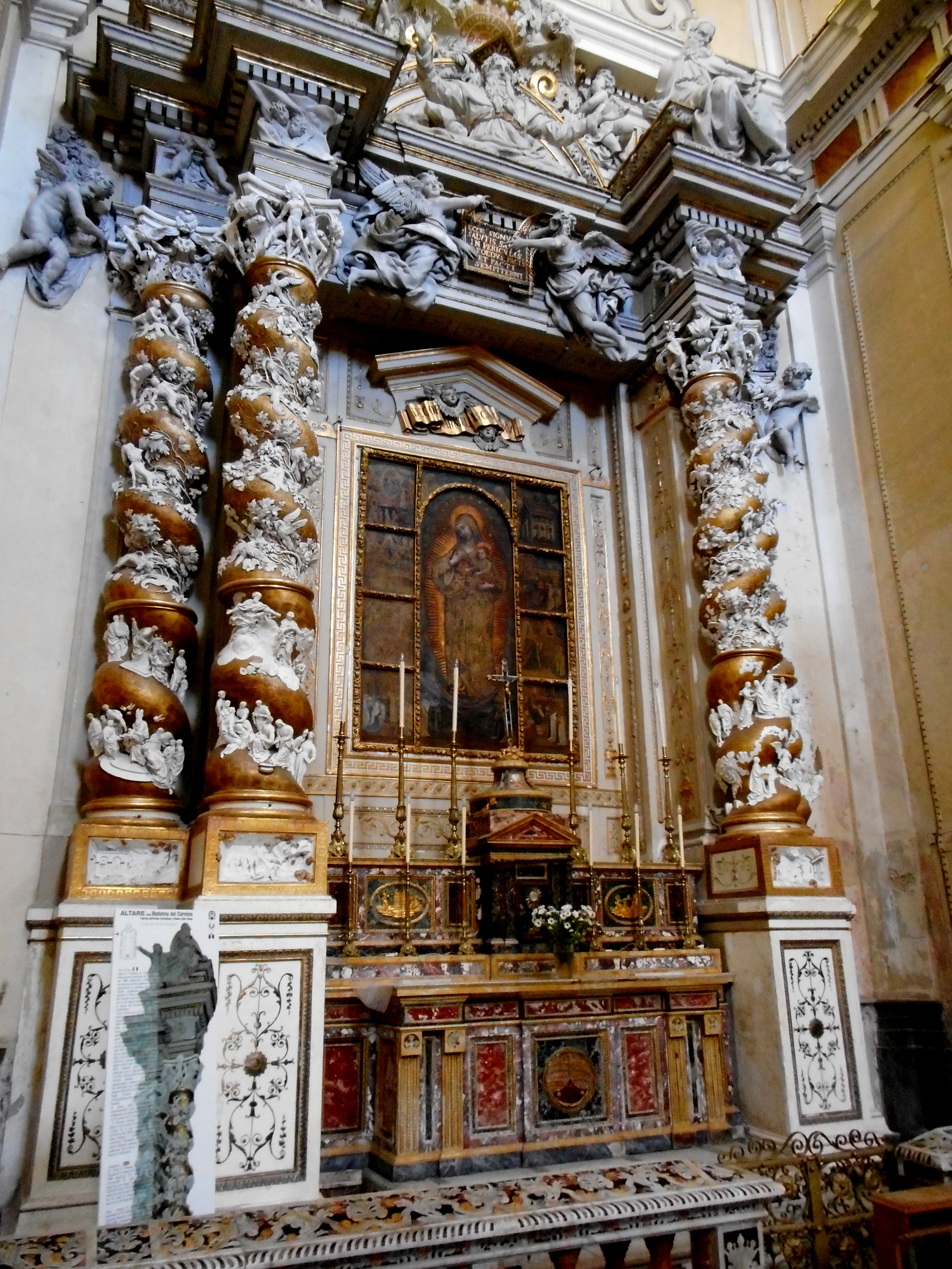 Cappella della Madonna del Carmine nel transetto sinistro della chiesa del Carmine Maggiore